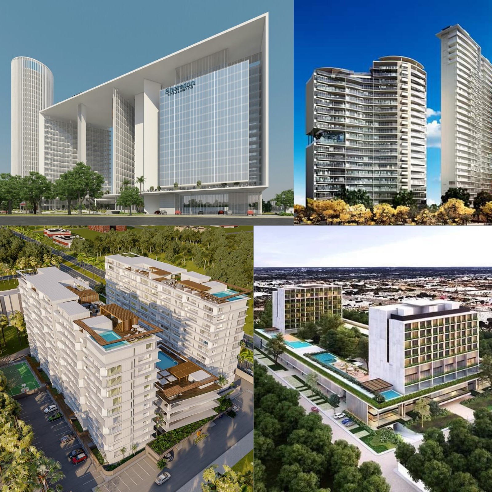 Proyectos de torres aún no realizadas en Mérida, Yucatán